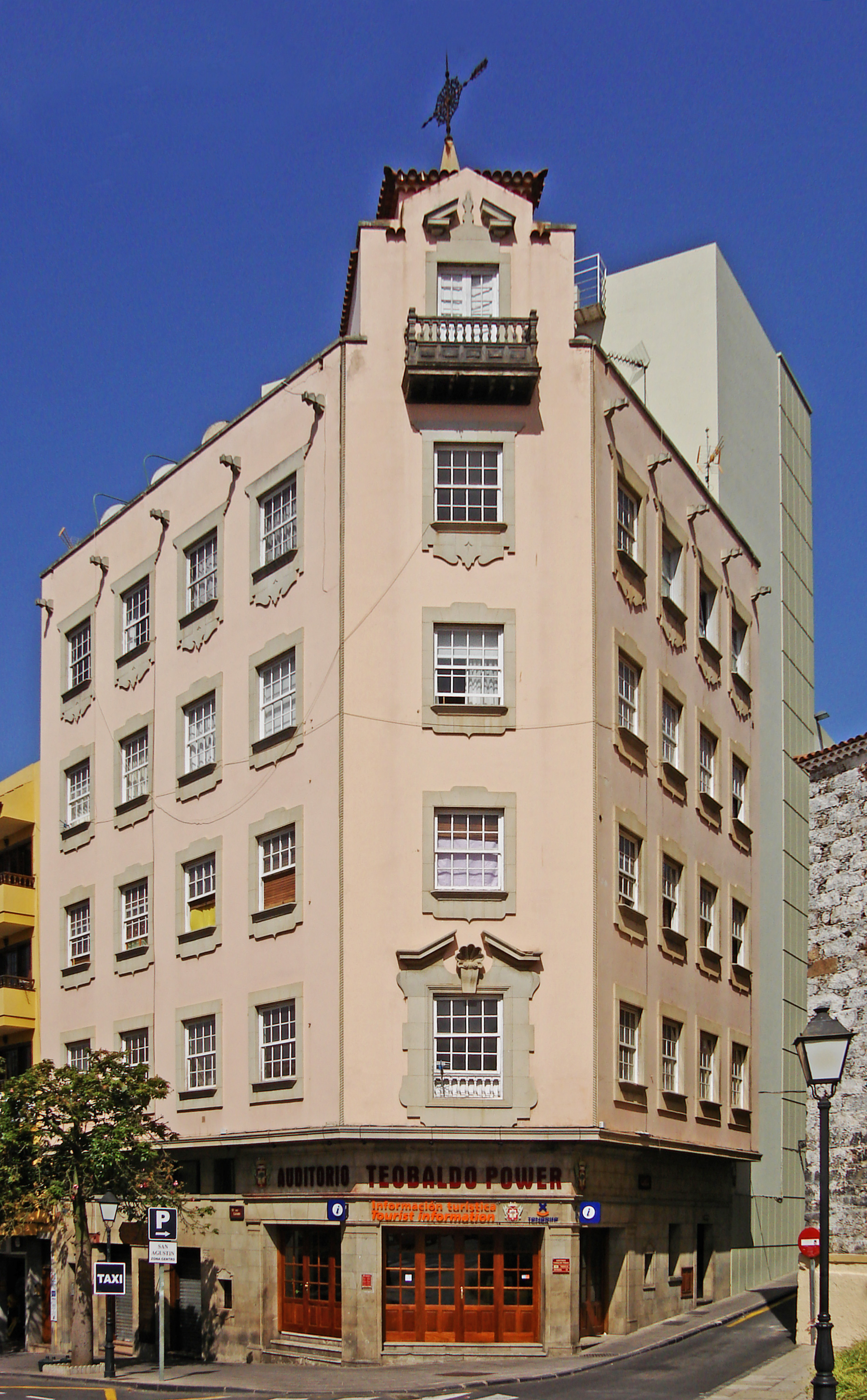 Das Gebäude des Auditorio Teobaldo Power in La Orotava wurde von dem Architekten José Enrique Marrero Regalado entworfen.